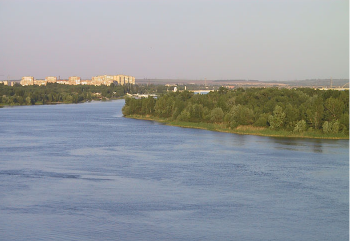 Острів зелений на території міста Дніпропетровська, вид з правого берега.